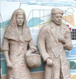 Jan und Libett, das Traditionspaar des Stoppelmarktes in Vechta, als Statuen